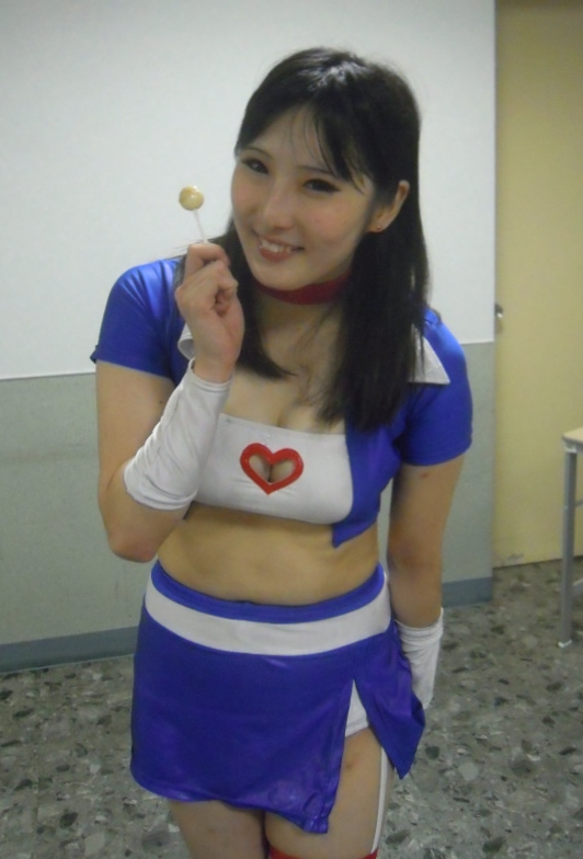 真琴 2013年8月25日 アイスリボン後楽園大会